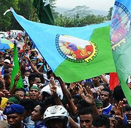 Flagge der PLP auf Wahlkampfveranstaltung in Gleno von António da Conceição.